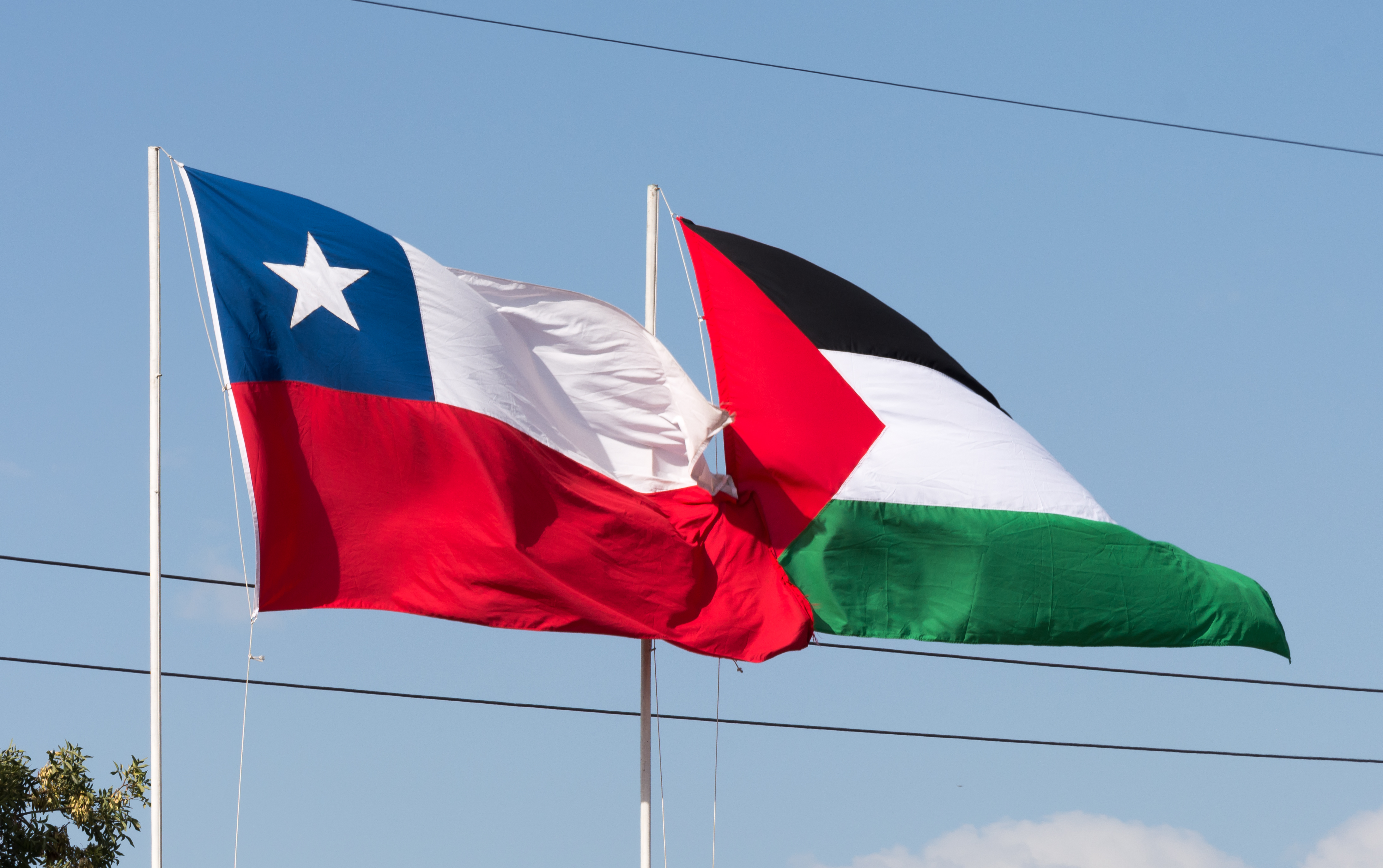 Banderas de Chile y Palestina, Palestino v Universidad de Concepción, Estadio Municipal de La Cisterna, La Cisterna, Santiago, Región Metropolitana, Chile.